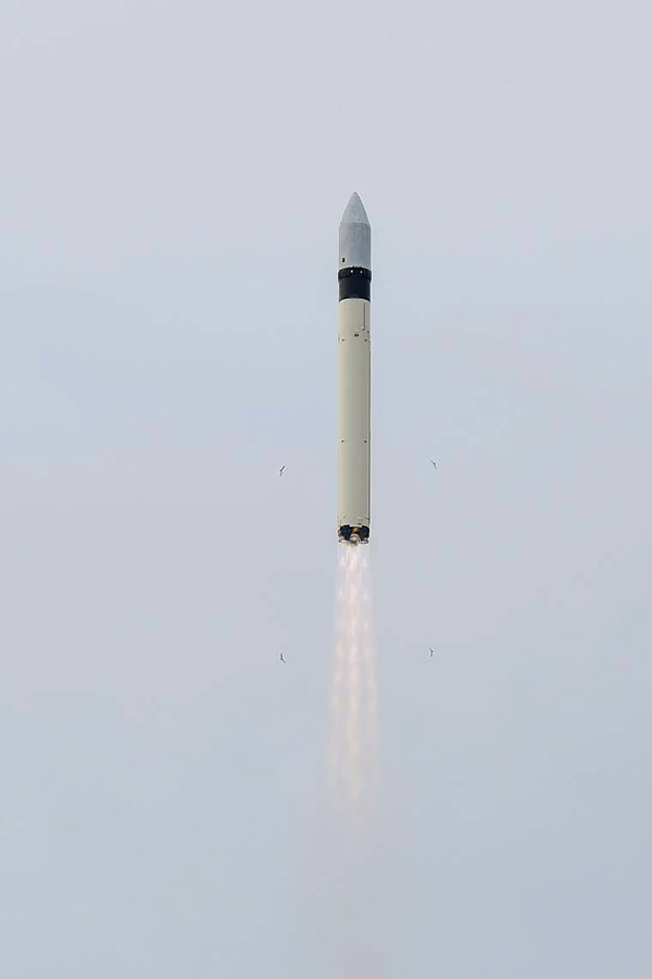 Пуск ракеты космического назначения легкого класса «Рокот» с блоком космических аппаратов связи «Гонец-М» (ГИК Плесецк, Архангельская обл.)